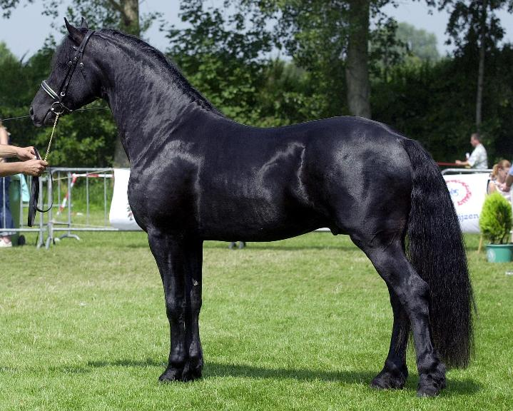 Arabo-Frisio